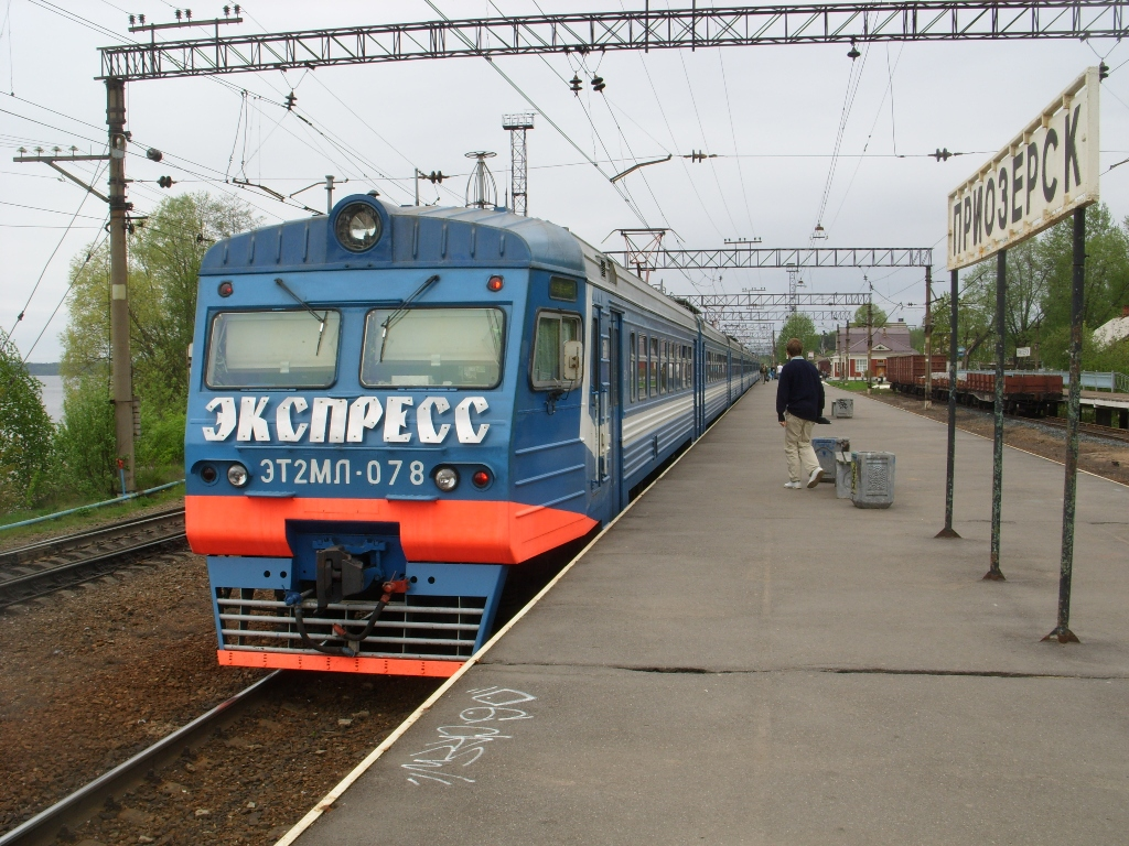 Электропоезд ЭТ2МЛ-078 на станции Приозерск.